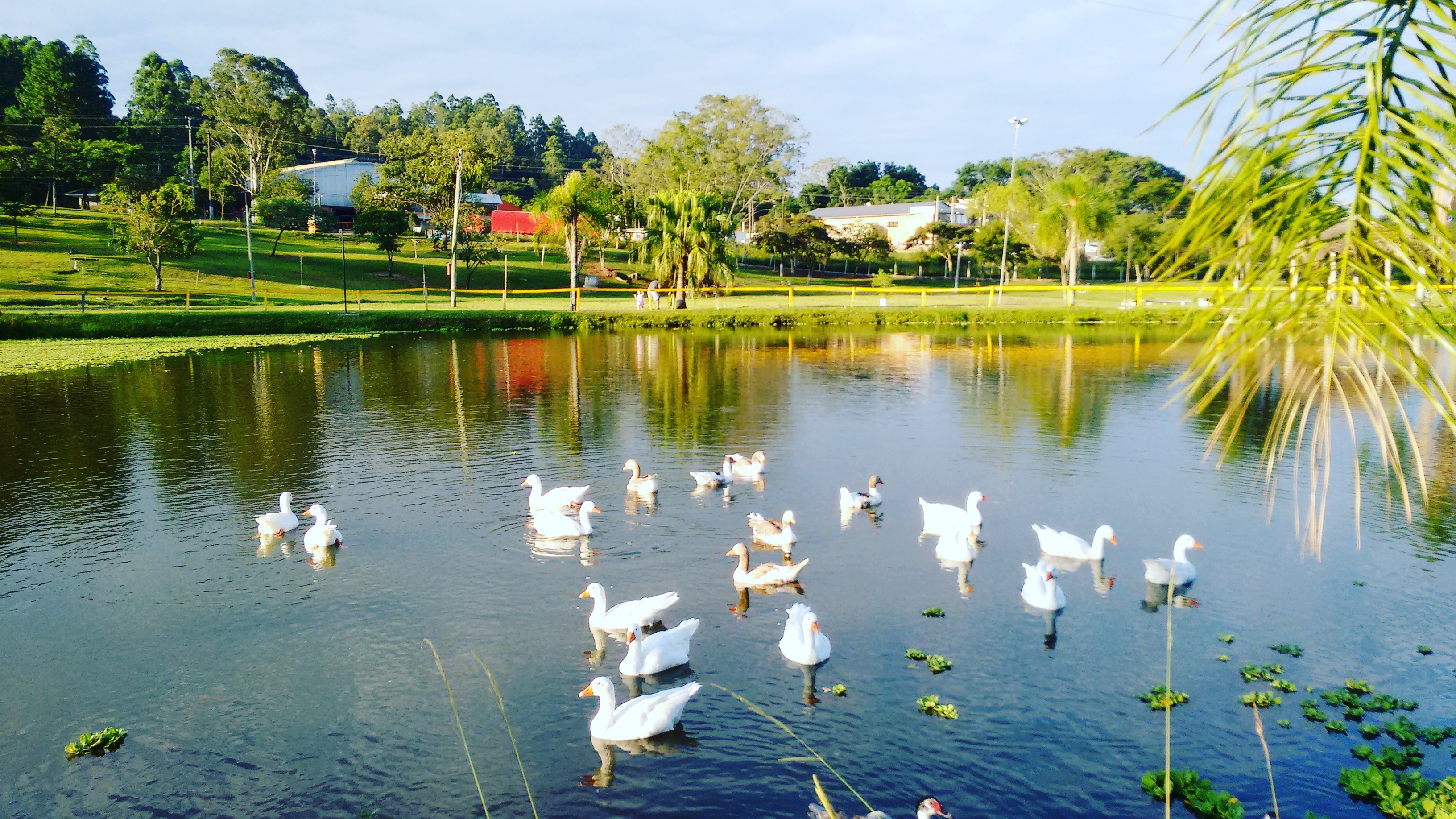 Patos nadando no lado do Parque Centenário, de Montenegro, cidade do Rio Grande do Sul.